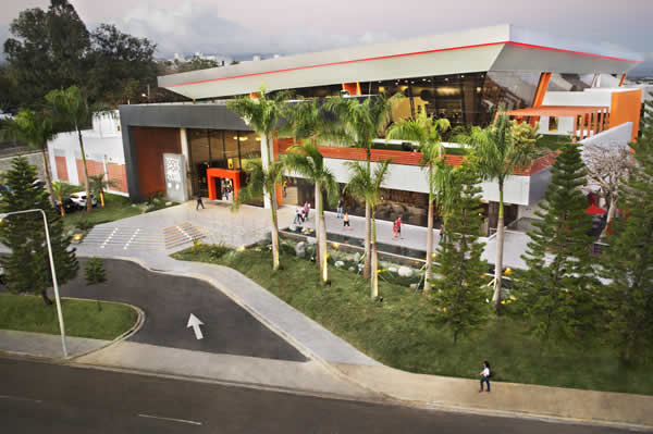 Athletic Club en calle Domingo Emilio Garcia